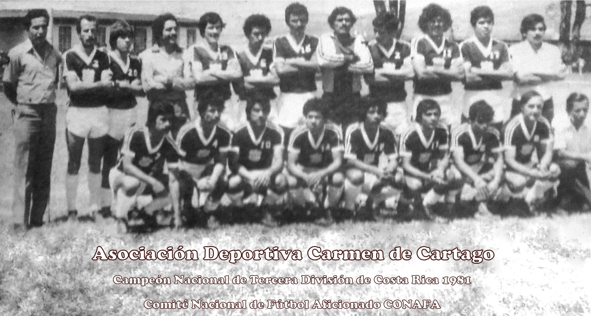 CAMPEON DE TERCERA DIVISION DE COSTA RICA 1981